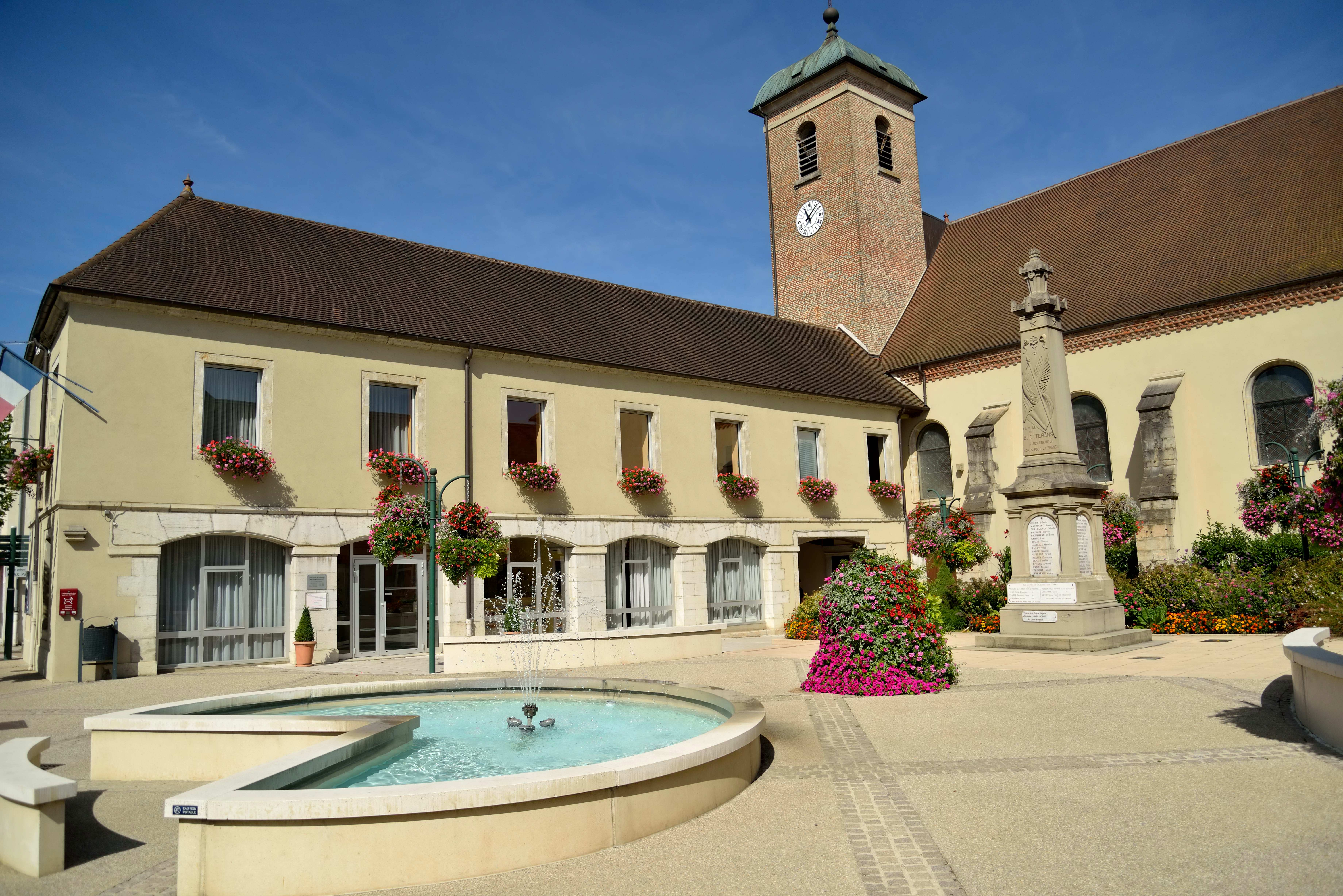 place de la mairie